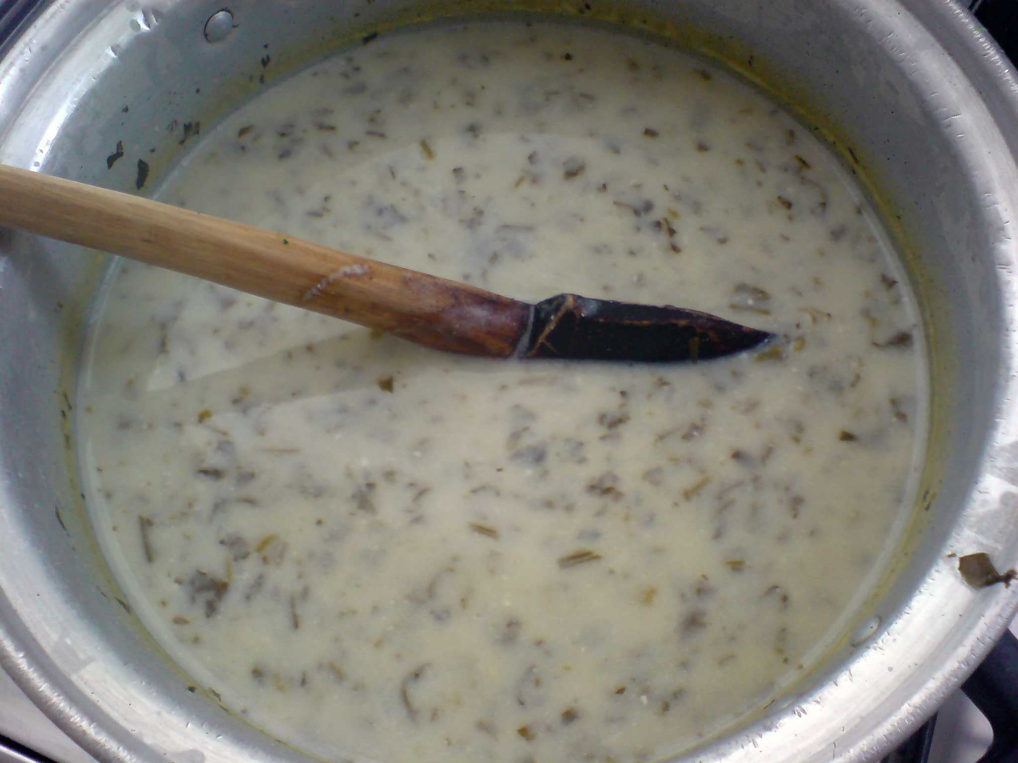 تصويري از غذاي آش دوغ، از عذاهای سنتی خطه آذربایجان و اردبیل. ‍‍‍‍‍‍مهرزاد پارس ۱۶ دسامبر ۲۰۰۸، ساعت ۱۶:۲۲ (UTC)